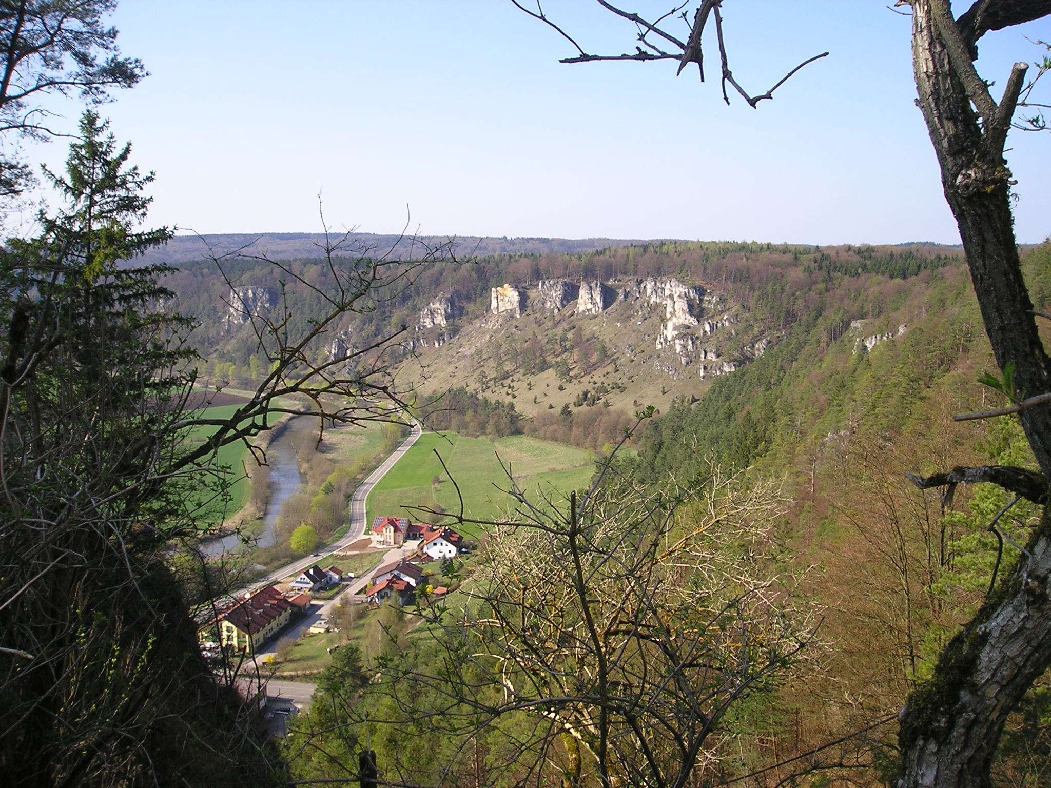 Naturschutzgebiet Arnsberger Leite im Altmühltal, gesehen von der Burgruine